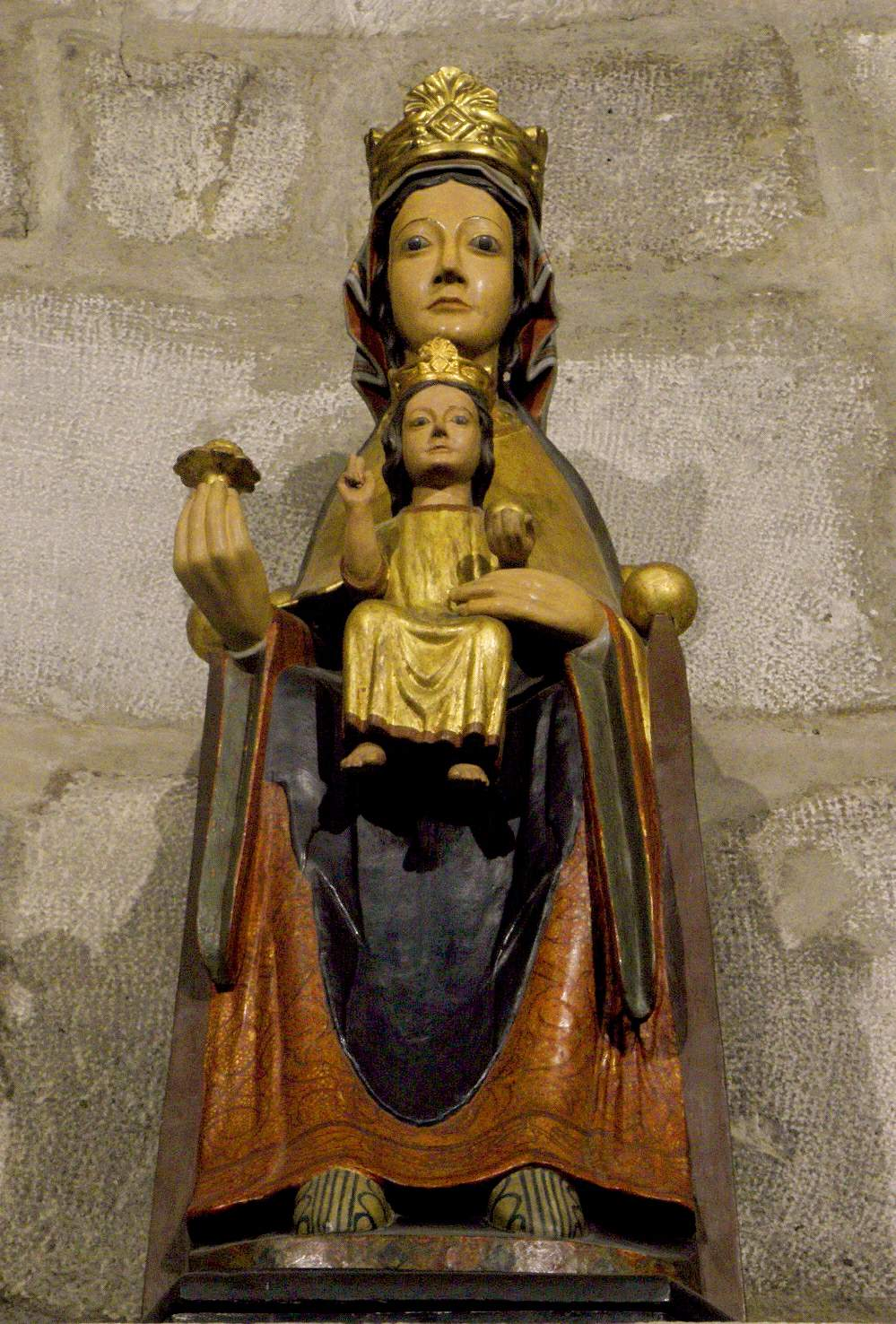 Virgen de Estíbaliz, en el Monasterio benedictino de Nuestra Señora de Estíbaliz (Álava)